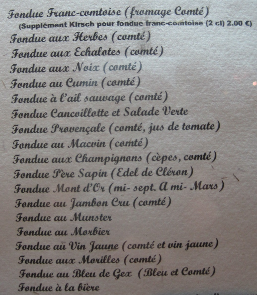 Plusieurs sortes de fondues au fromage